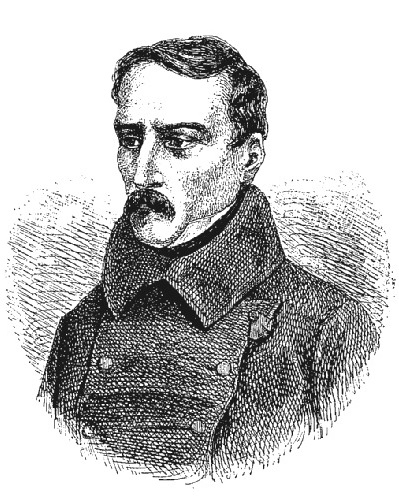 "Godefroi Cavaignac (1801-1845)".